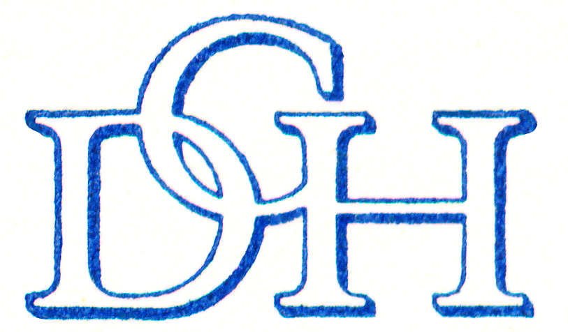 Den Grafiske Højskoles første logo